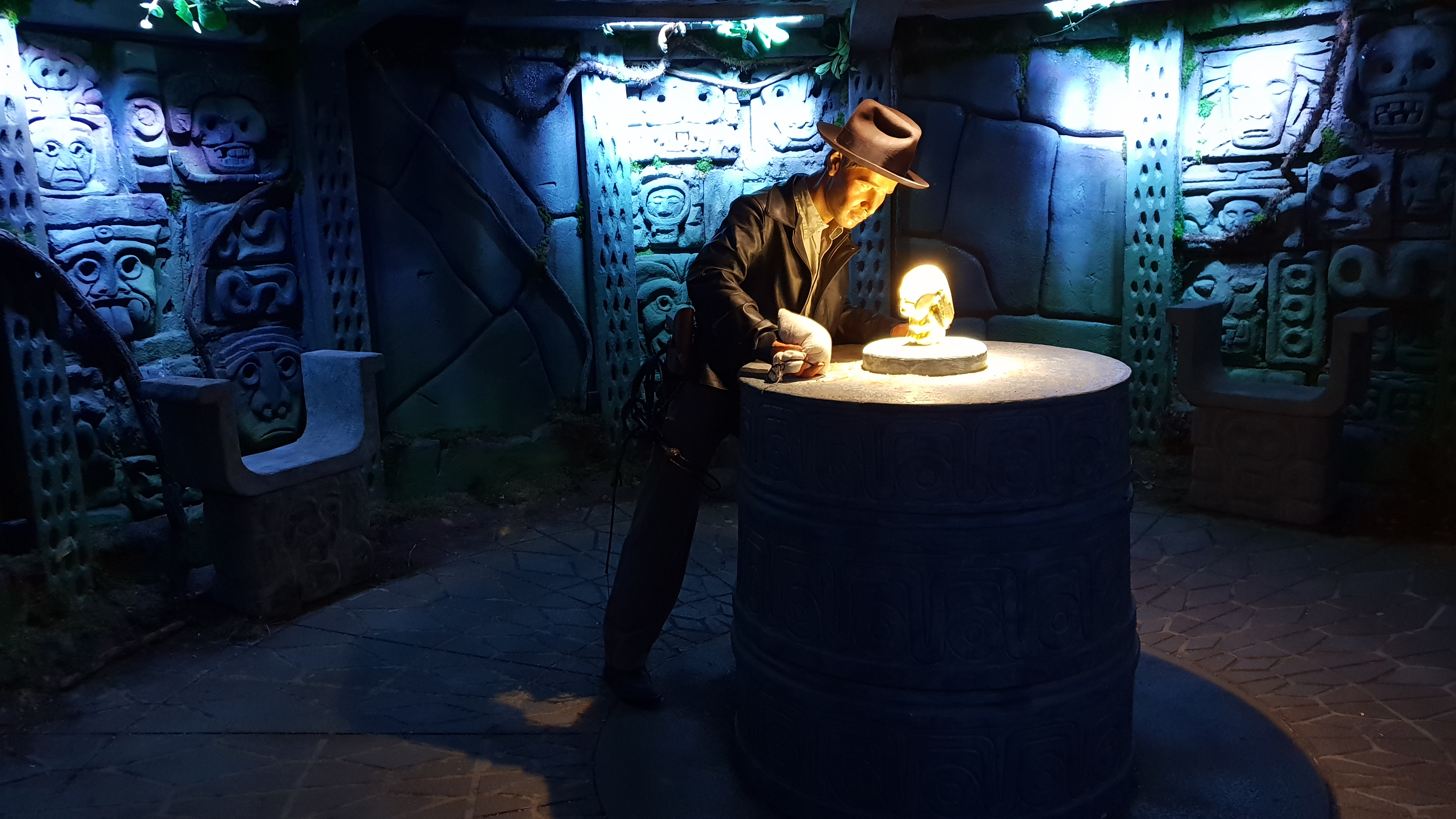 Reconstitution des décors des films Indiana Jones à l'exposition Génération 80 Experience, Liège (Belgique)